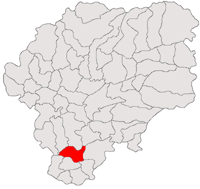 Categorie:Hărţi ale judeţului Bistriţa-Năsăud